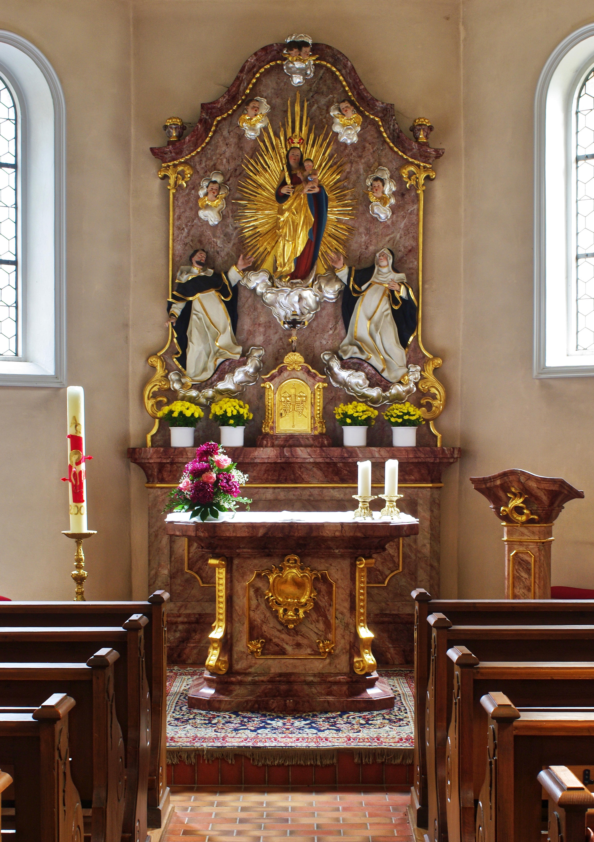 Rosenkranzkapelle oder auch Sägendobelkapelle genannt